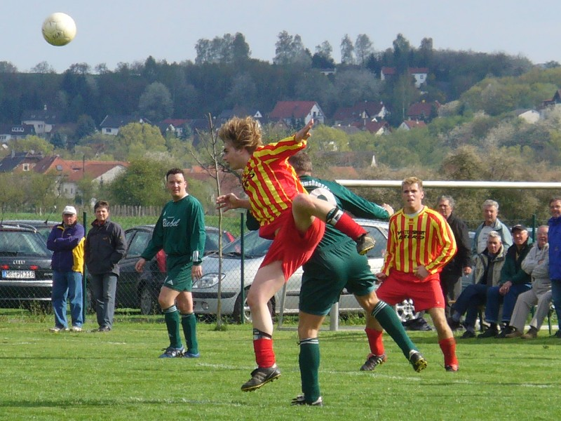 FSG Südkreis Match in 2006